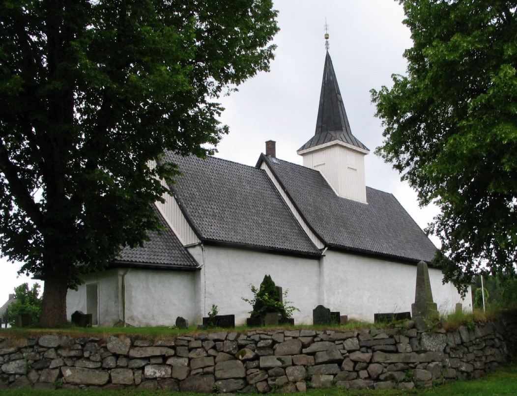 Idd kirke og en del av kirkegården sett fra nordøst